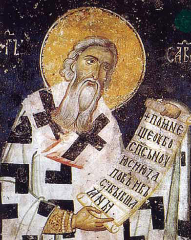 Св. Сава Неманић. Фреска из XIII века у цркви Светих Апостола у Пећи, Косово.